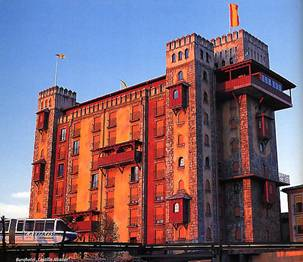 l'entrée de l'hotel al canzar